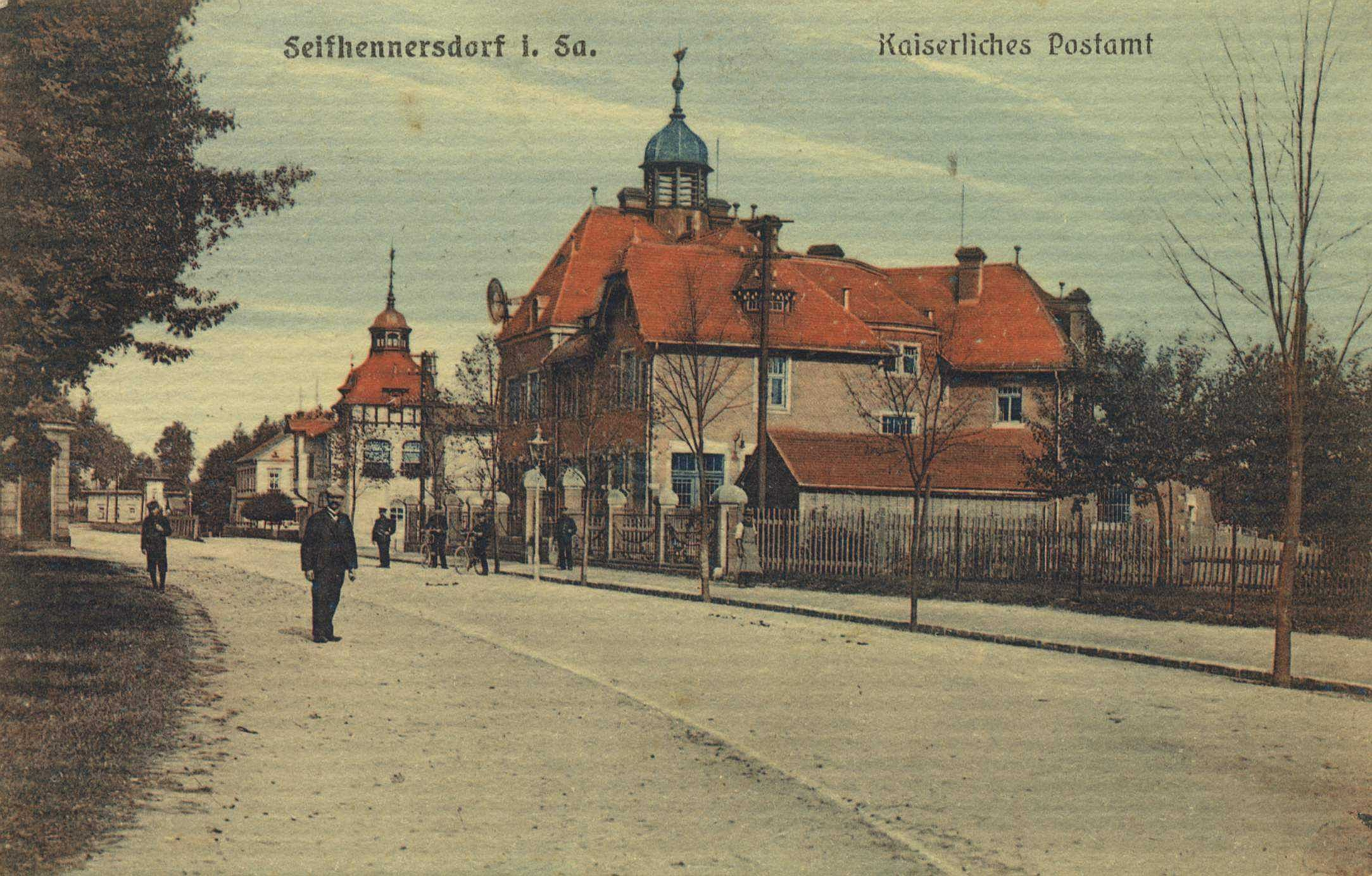 Das Kaiserliche Postamt in Seifhennersdorf in Sachsen, Deutschland.